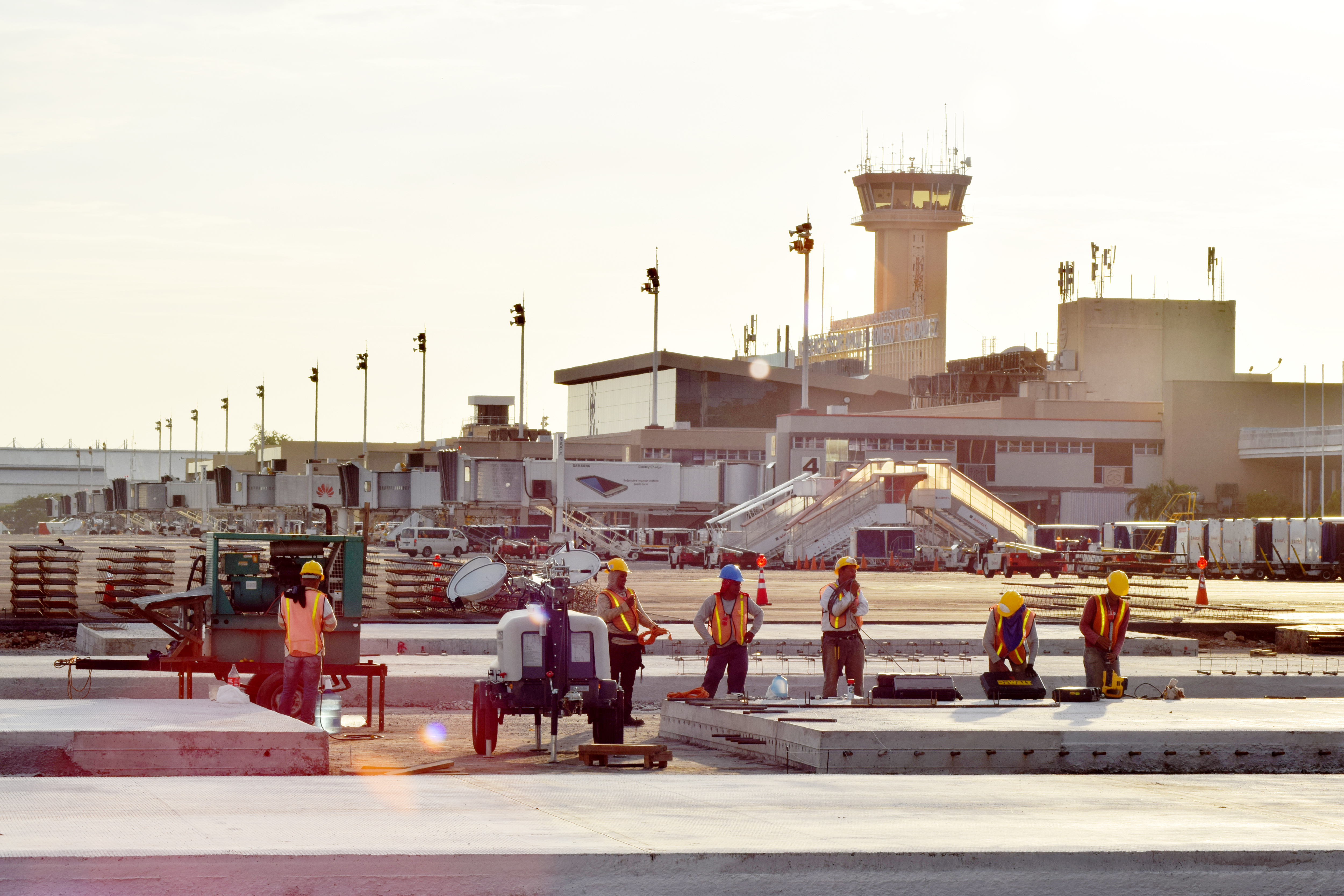 Presidente de CEPA, El Salvador, Aeropuerto Internacional de El Salvador, Nelson Vanegas.